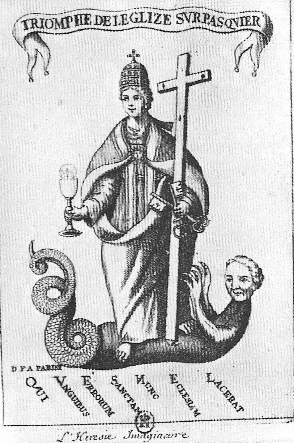 Gravure antijanséniste représentant la défaite de Pasquier Quesnel